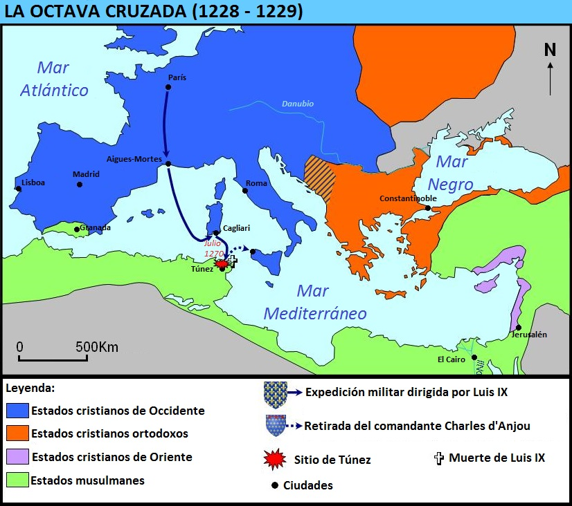 Mapa de la octava cruzada